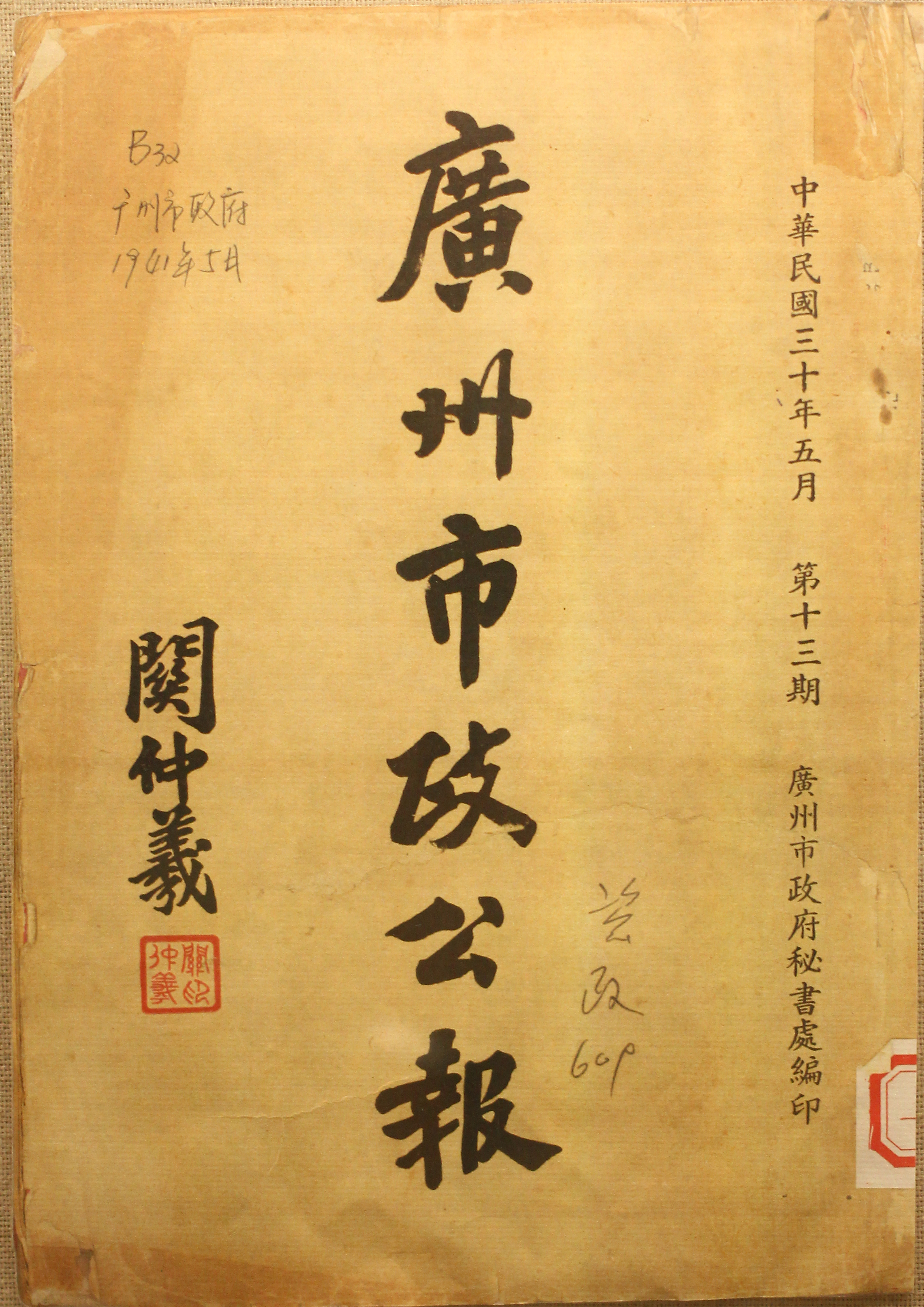 《廣州市市政公報》第十三期封面，關仲羲。中華民國三十年五月。廣州市政府秘書處編印。當時為汪精衛政權統治時期。